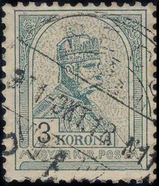 Почтовая марка Венгрии, портрет Франца Иосифа I в короне Святого Стефана, 1900